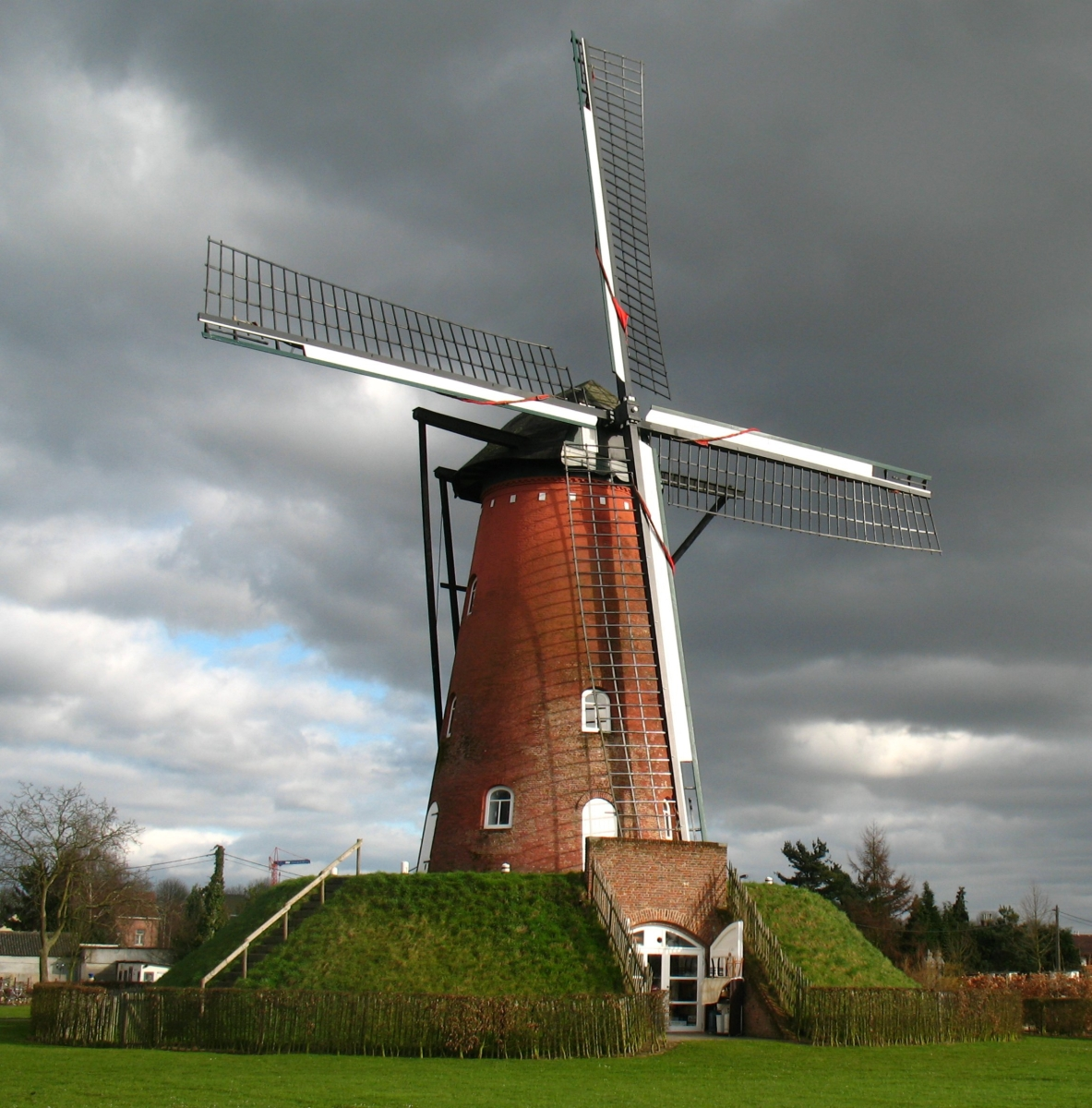 De Molen van Oelegem te Oelegem, provincie Antwerpen